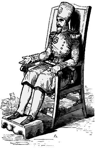 Ahmed I Pacha, Bey de Tunis, sur le trône d'ivoire